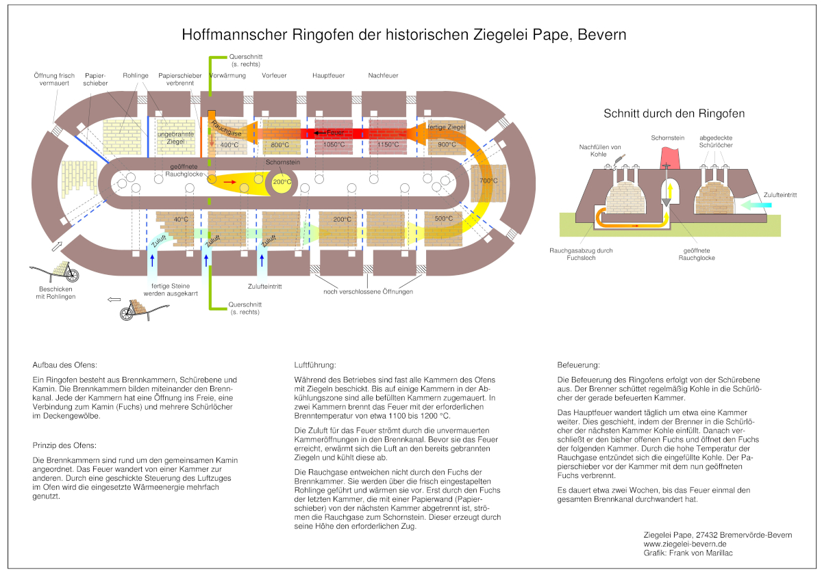 Funktion des Ringofens der historischen Ziegelei Pape, Bevern